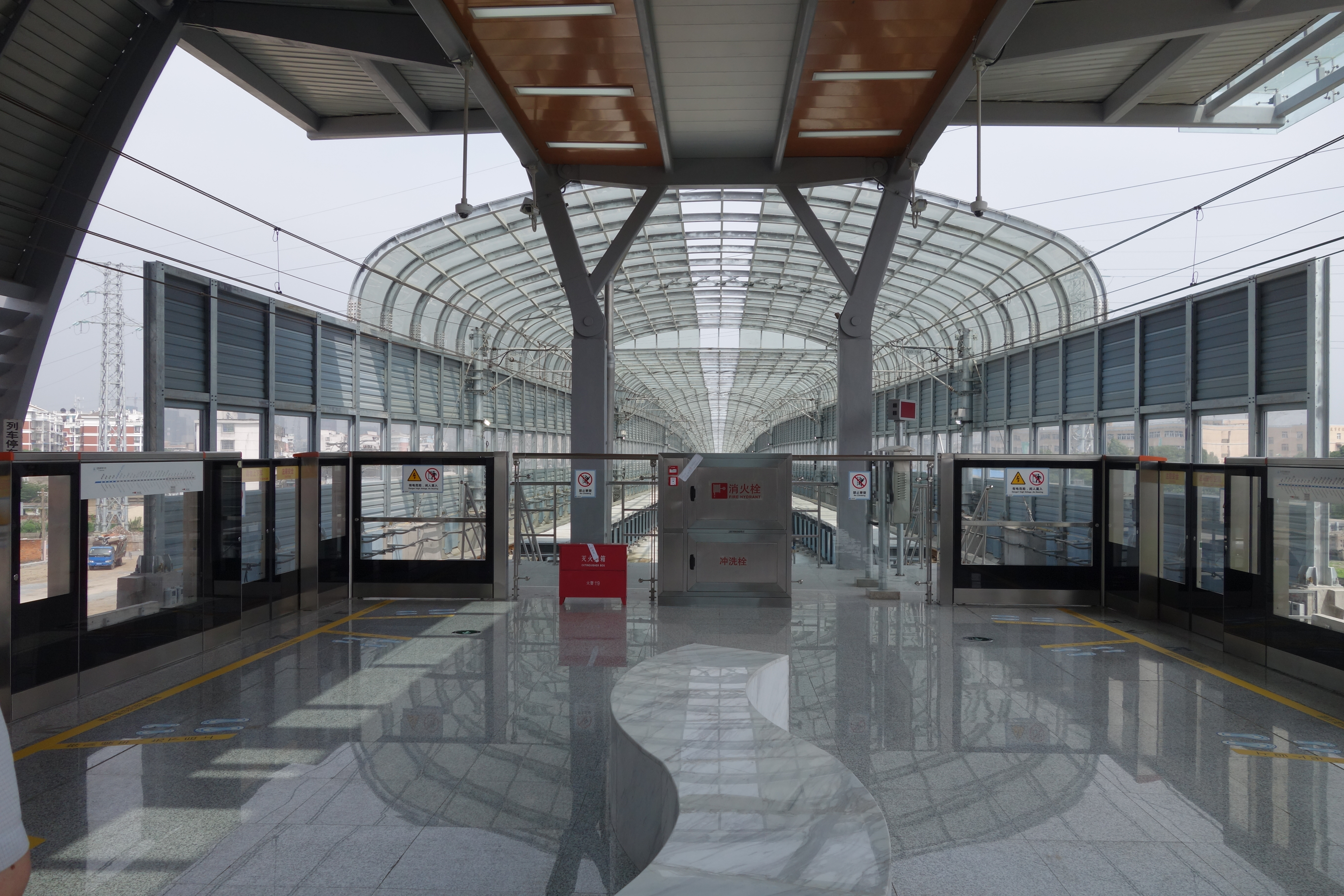 徐家漕长乐站站台